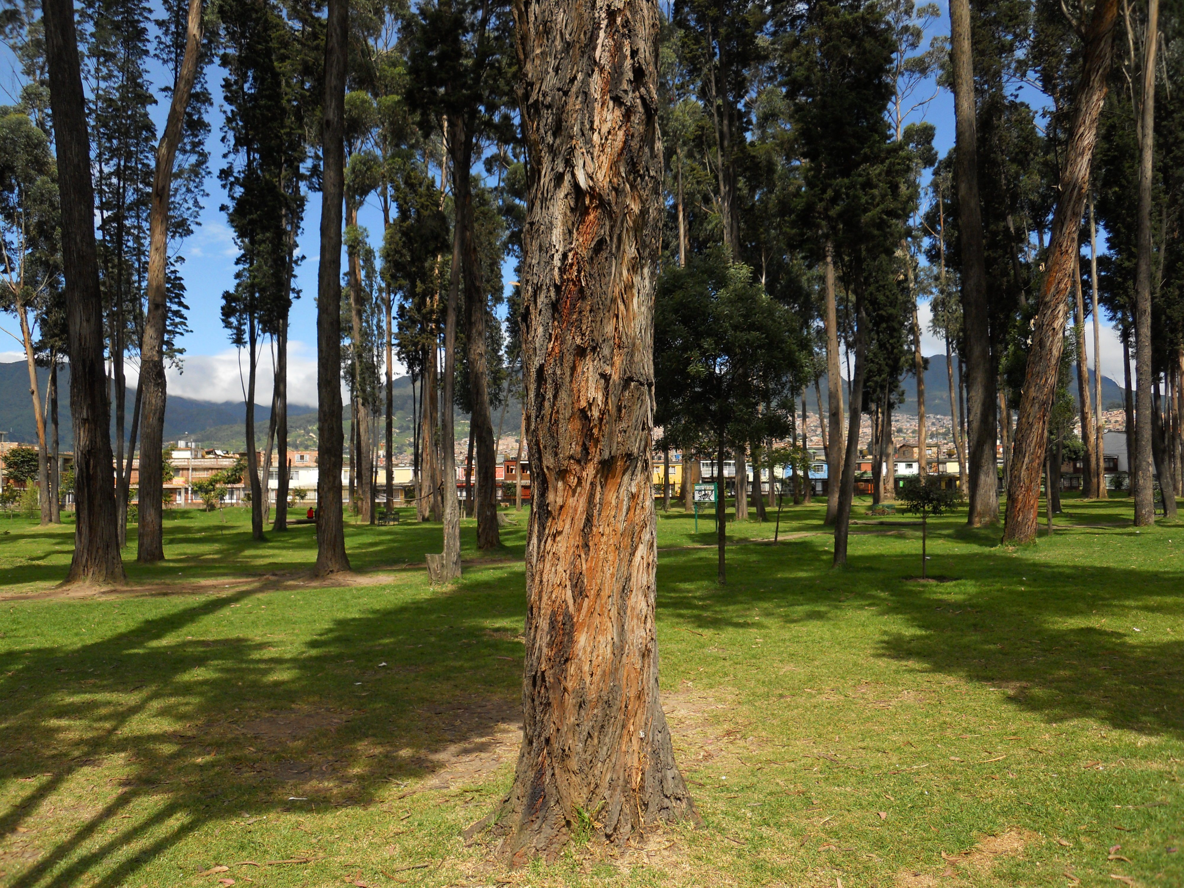 Bosque de San Carlos en Bogotá. Barrio Restrepo localidad de Rafael Uribe.